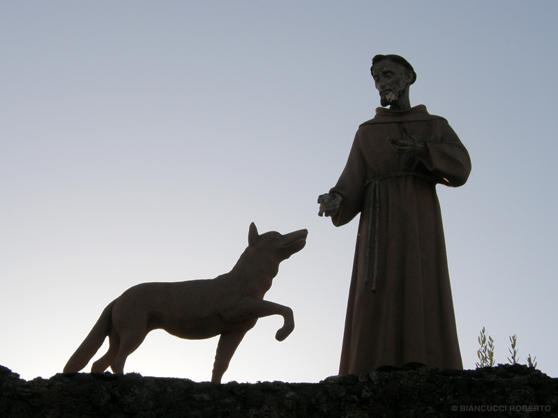 Monumento a San Francesco